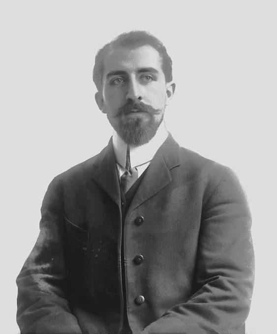 Photo de Louis Fernand Henri de Miffonis datée d'avril 1908. La photo provient des studios Topley